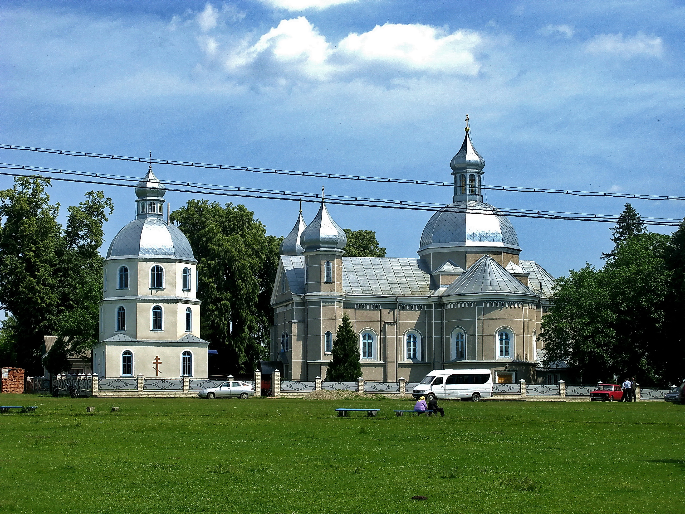 Biserica „Sfânta Maria” din Volcineț, raionul Adâncata, regiunea Cernăuți, Ucraina